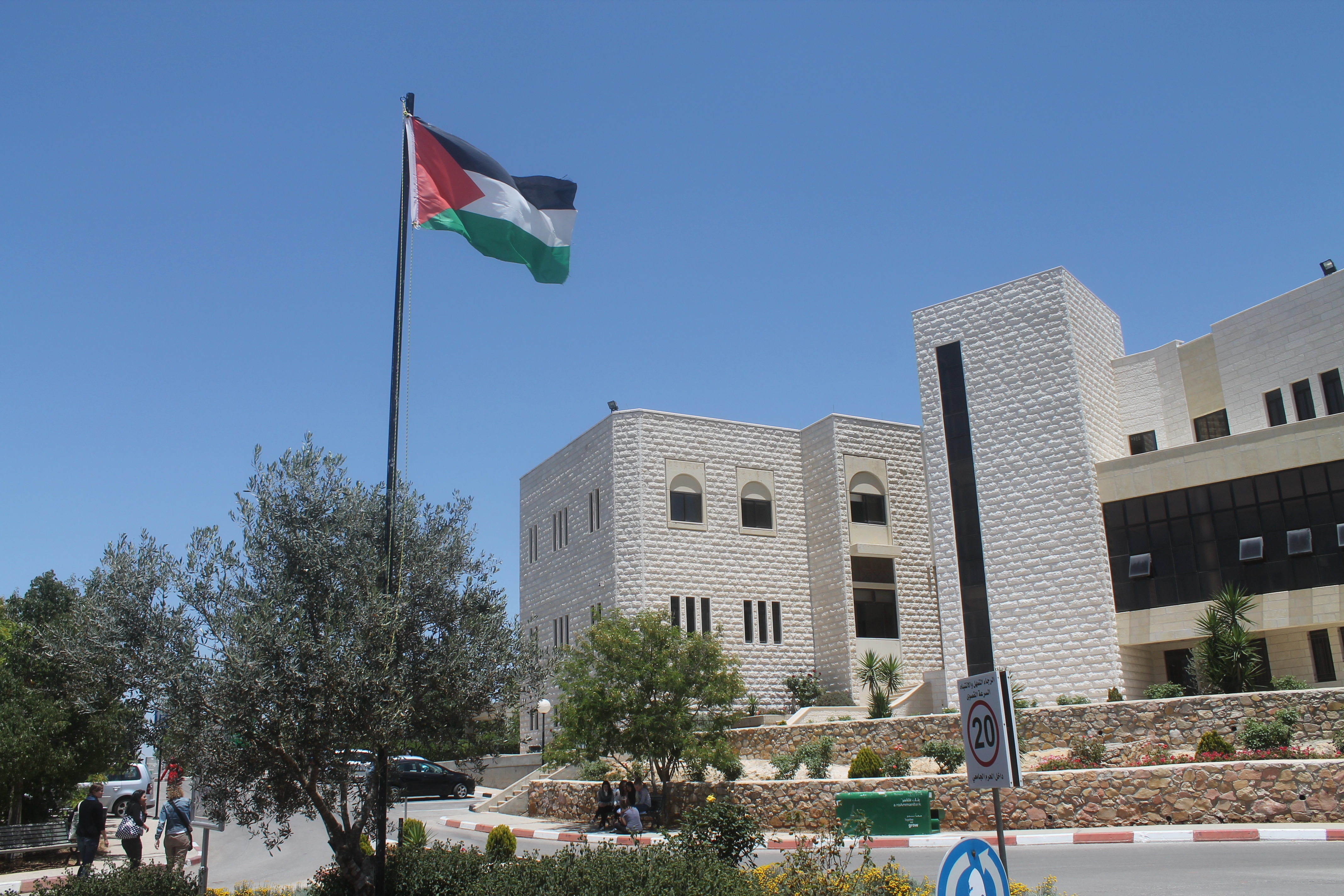 Campus